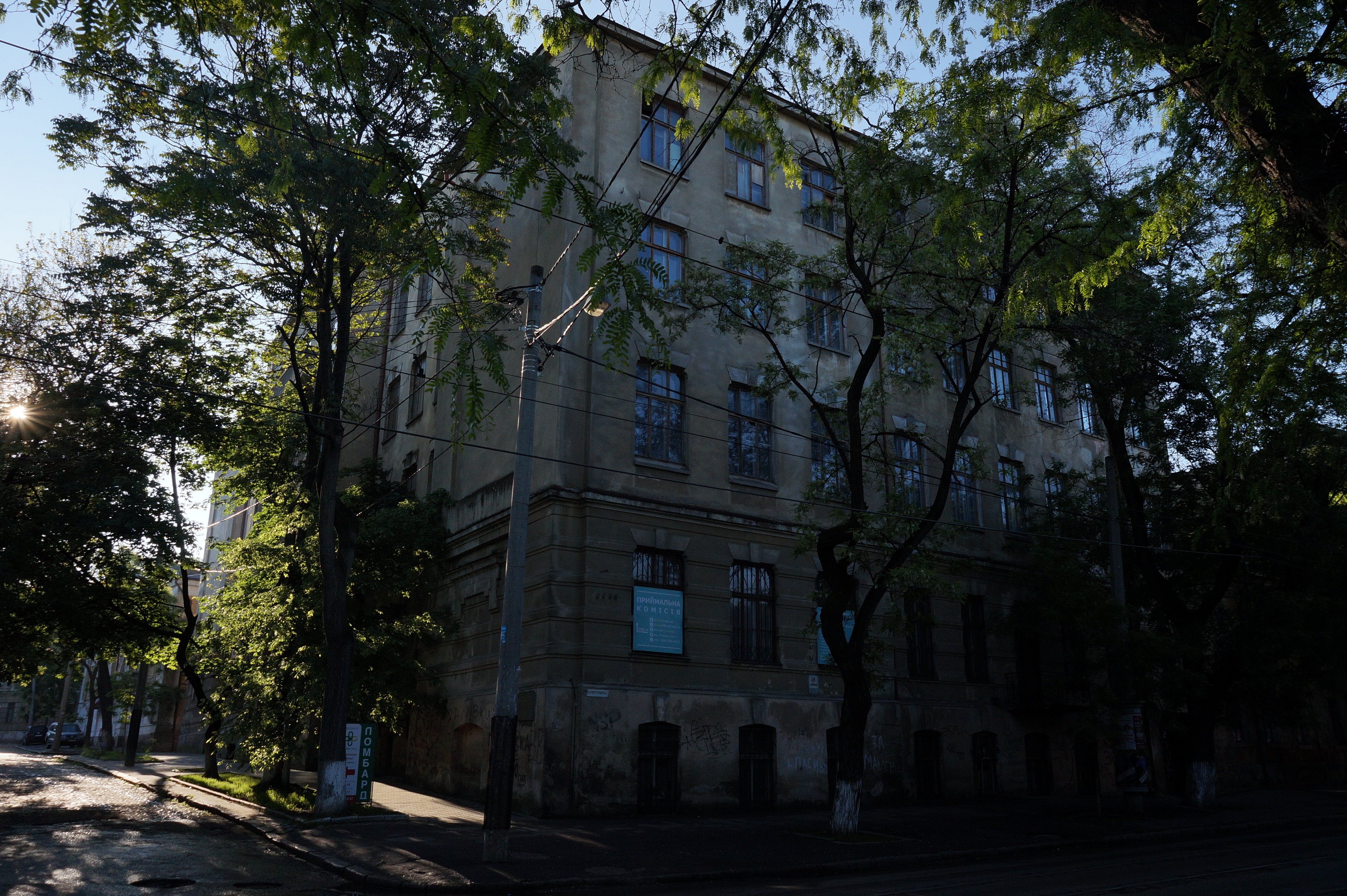 Будівля училища Менделєвича, Одеса, вул. Старопортофранківська, 61